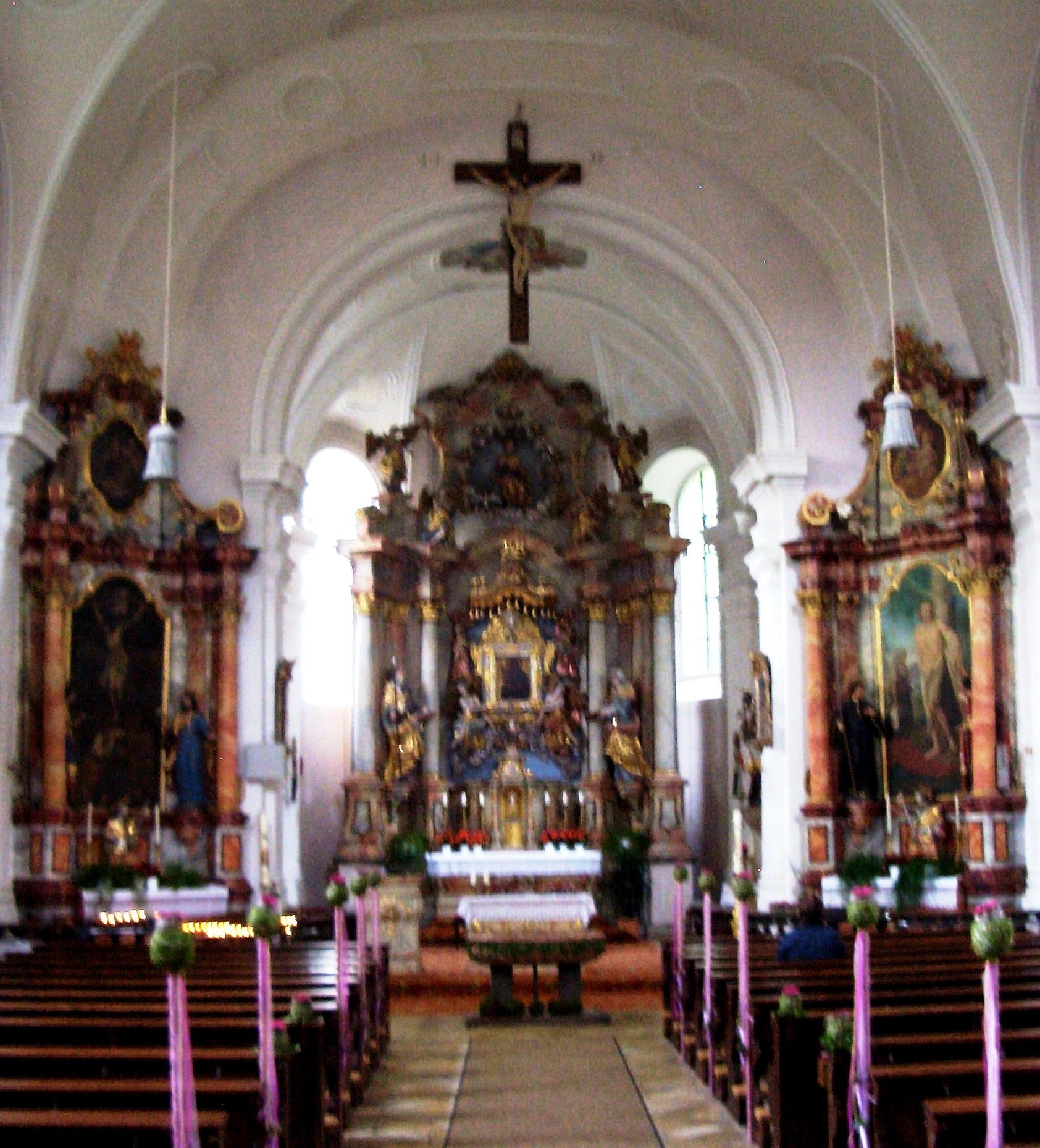 Wallfahrtskirche Heilbrünnl, Roding: Hochaltar und Seitenaltäre